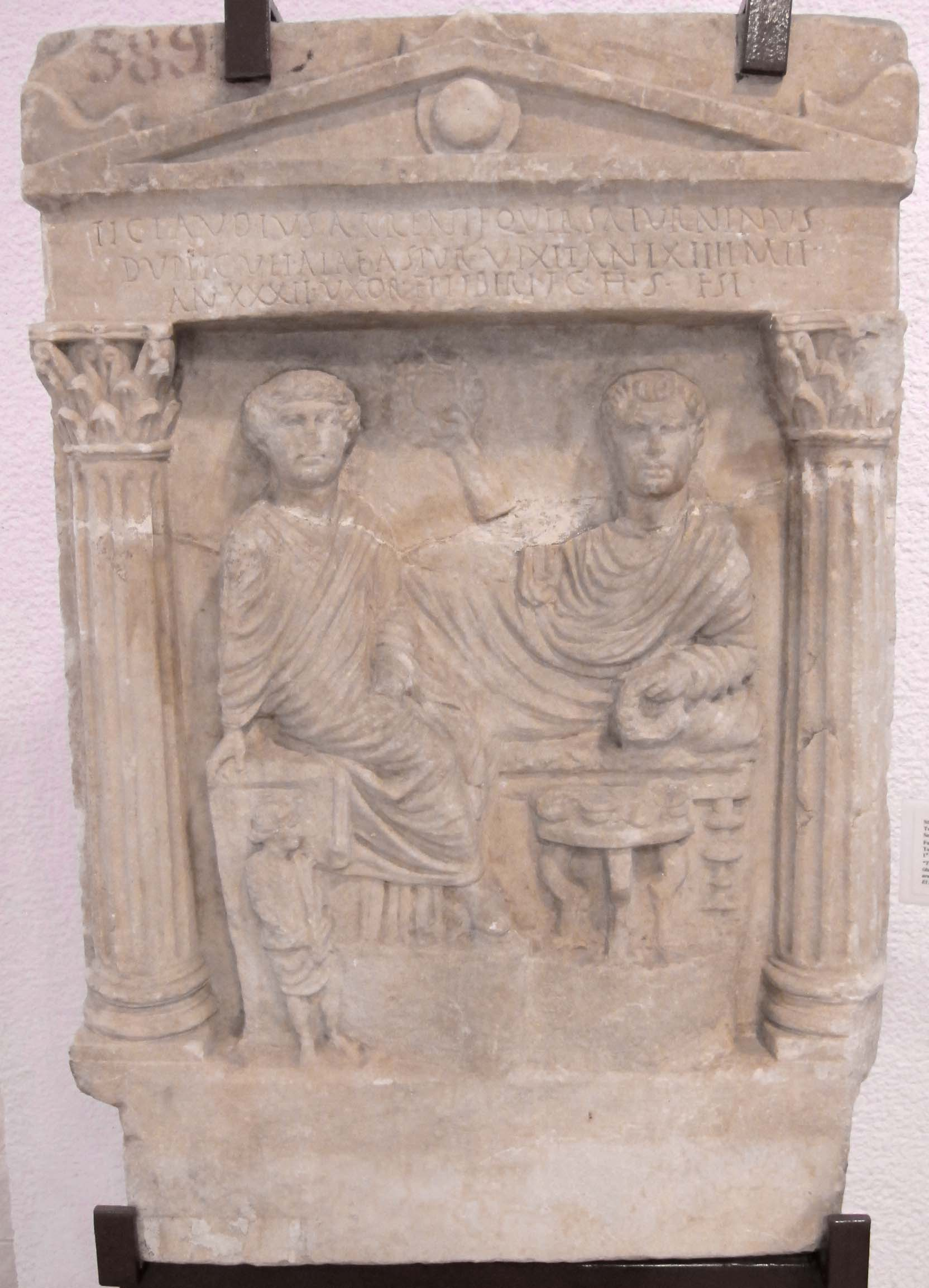 Tomis, stele funeraria di tiberio claudio saturnino, I sec. AE 1988, 998: Ti(berius) Claudius Arrenti f(ilius) Quir(ina) Saturninus / duplic(arius) vet(eranus) alae Astur(um) vixit an(nos) LXIIII mil(itavit) / an(nos) XXXII uxor et liberi f(aciendum) c(uraverunt) h(ic) s(itus) e(st)